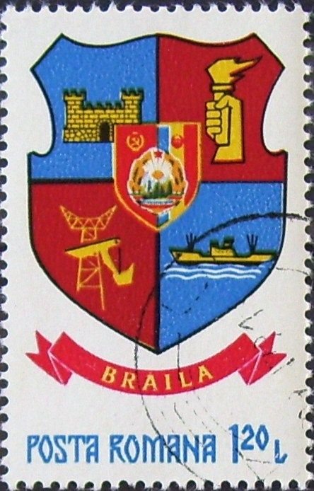 Source: Post of Romania